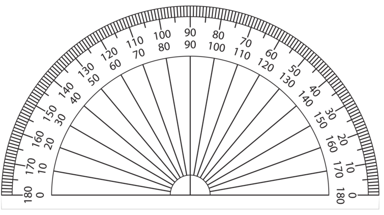 Gradeboog